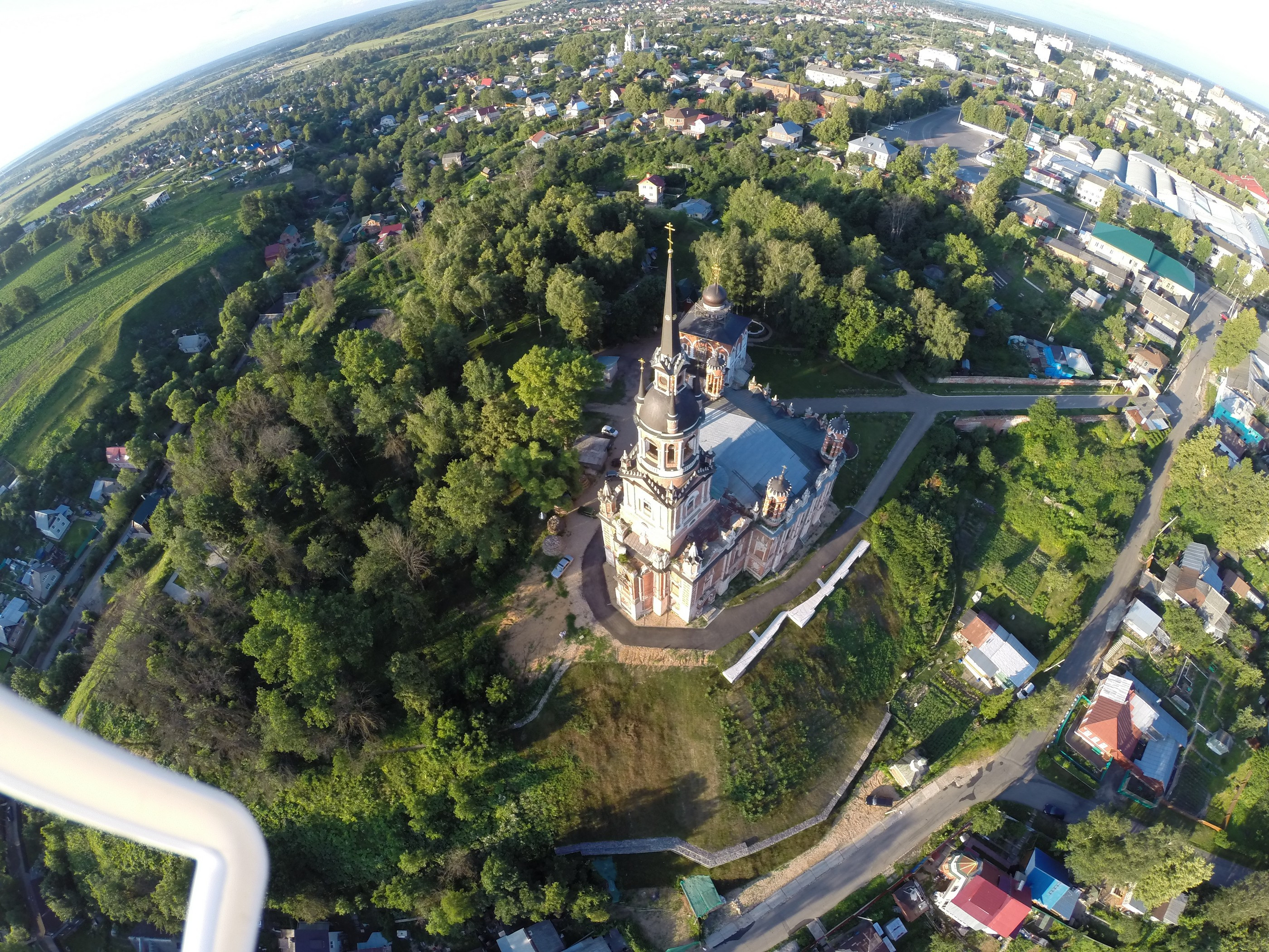 Никольский собор с дрона